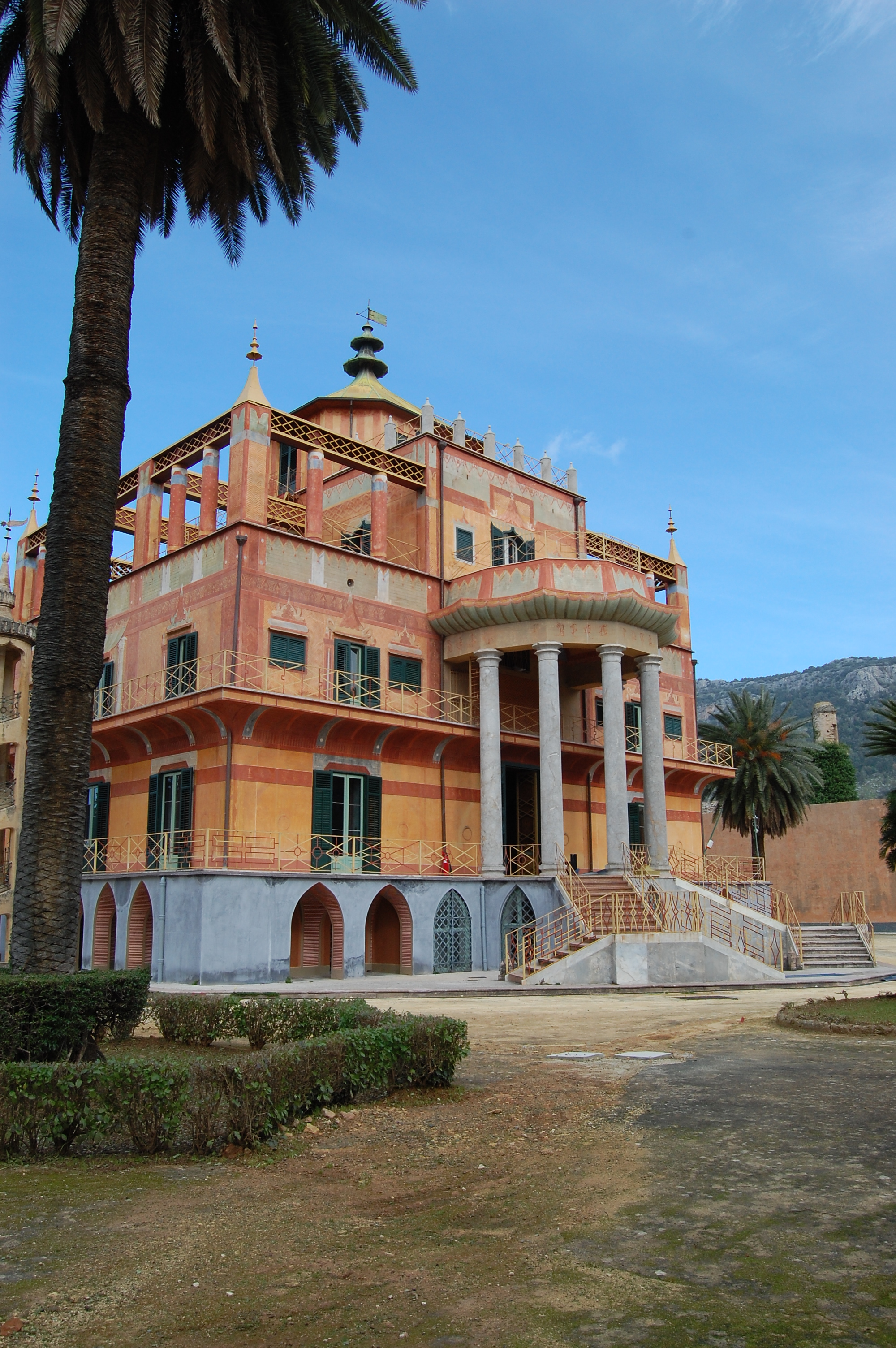 Palazzina cinese Riserva naturale Monte Pellegrino